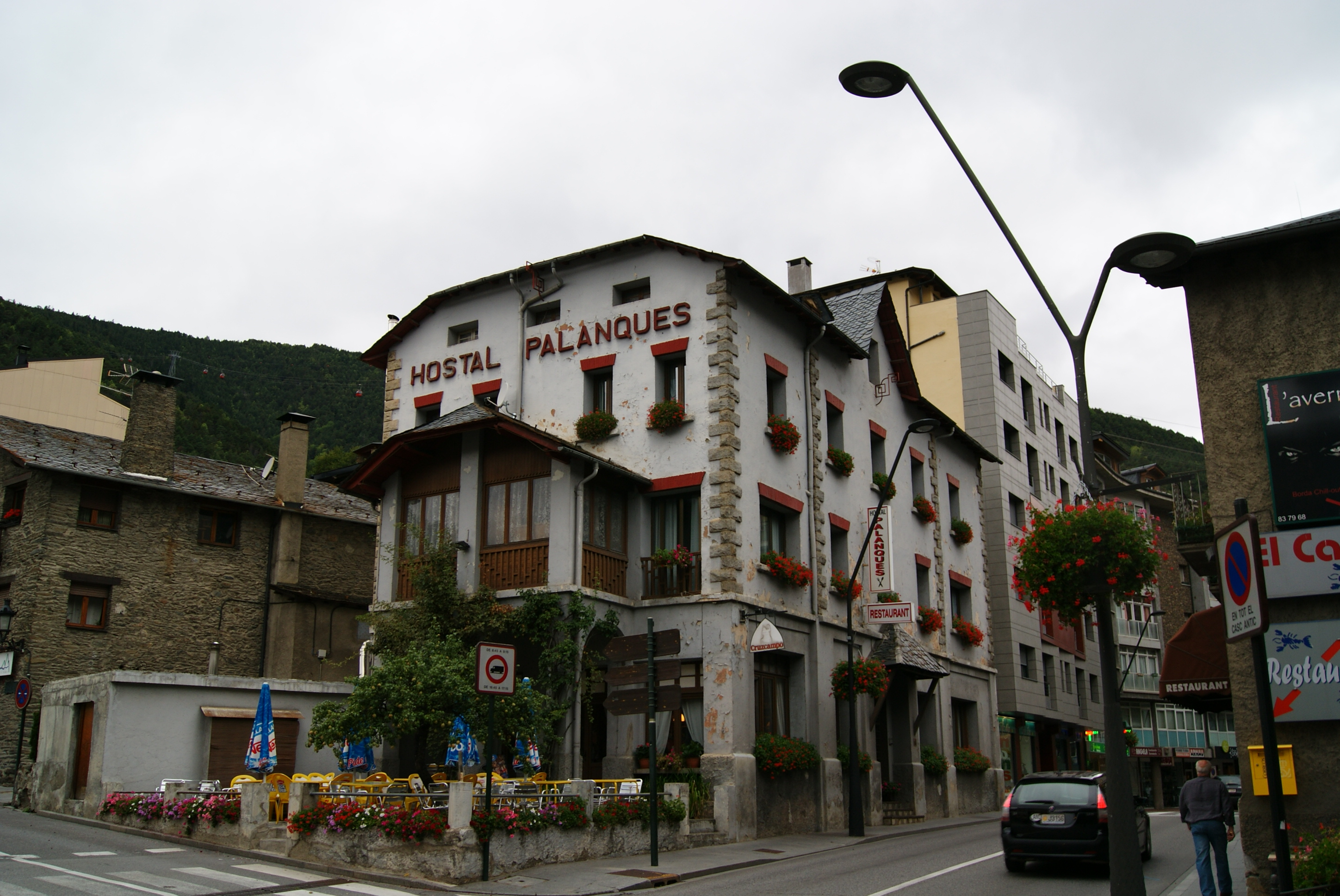 Hostal Palanques (La Massana)